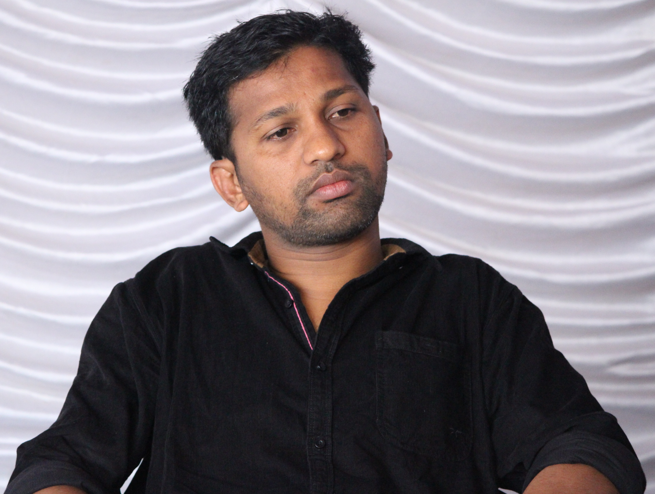 P. V. Shajikumar at Kerala Literature Festival, 2017